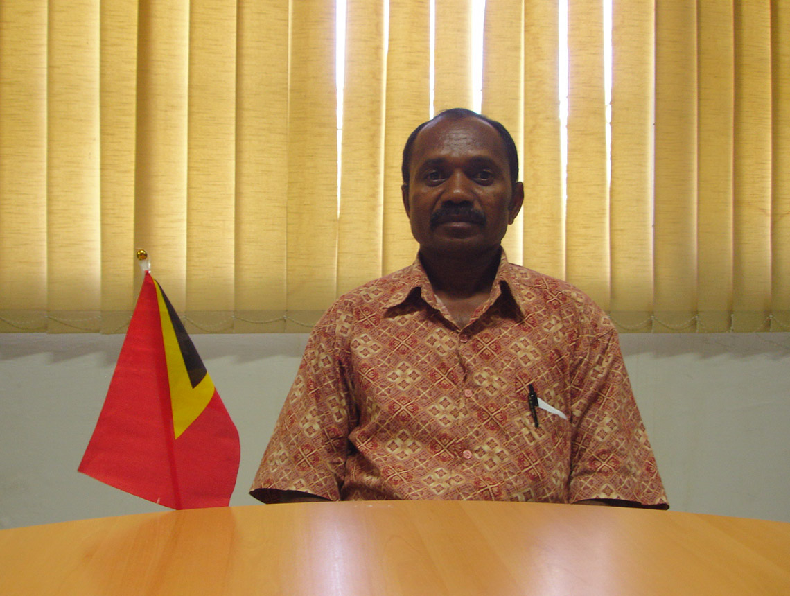 Marcos dos Santos, Administrator des Subdistrikts Aileu